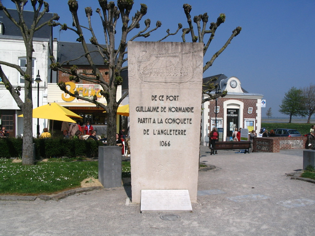 Monument sur Guillaume-le-conquérant, place de la bourse, à Saint-Valéry-sur-Somme, France.